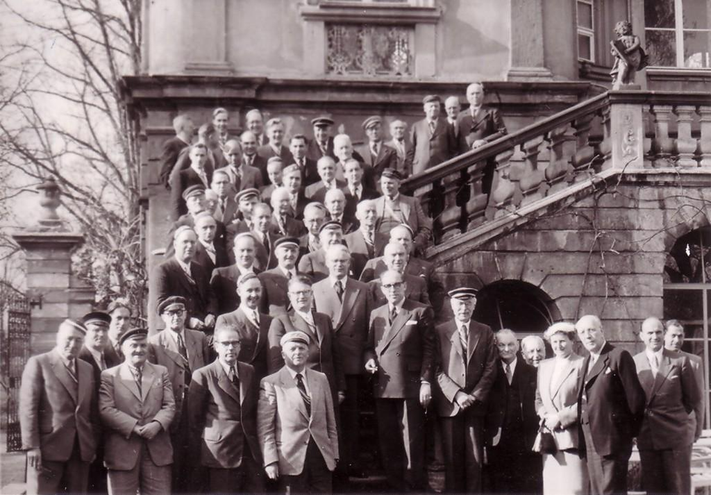 Die Teilnehmer der Deutschen Studentenhistorikertagung in Würzburg vor dem Huttenschlösschen, 1954